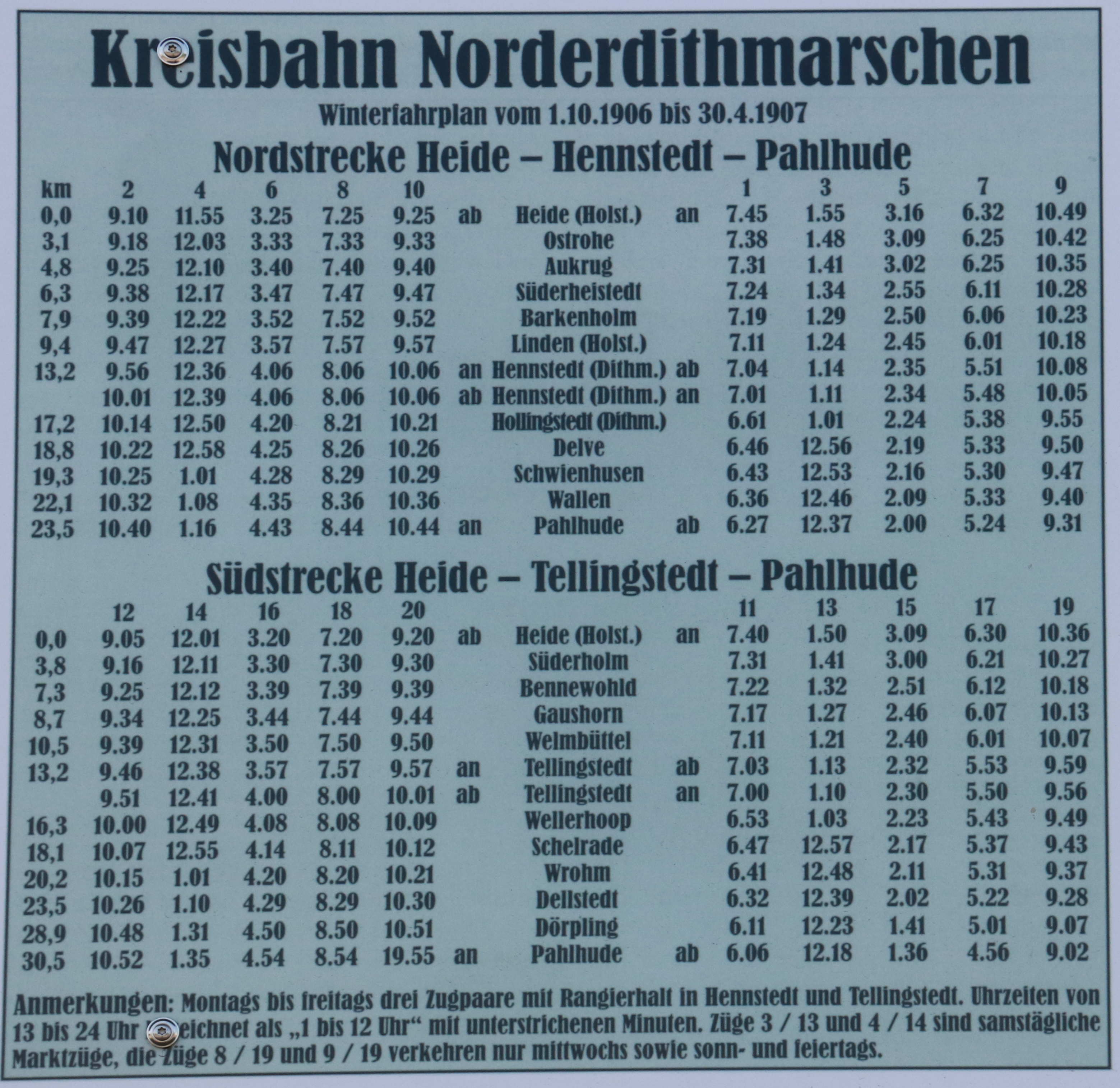 Fahrplan Kreisbahn 1907